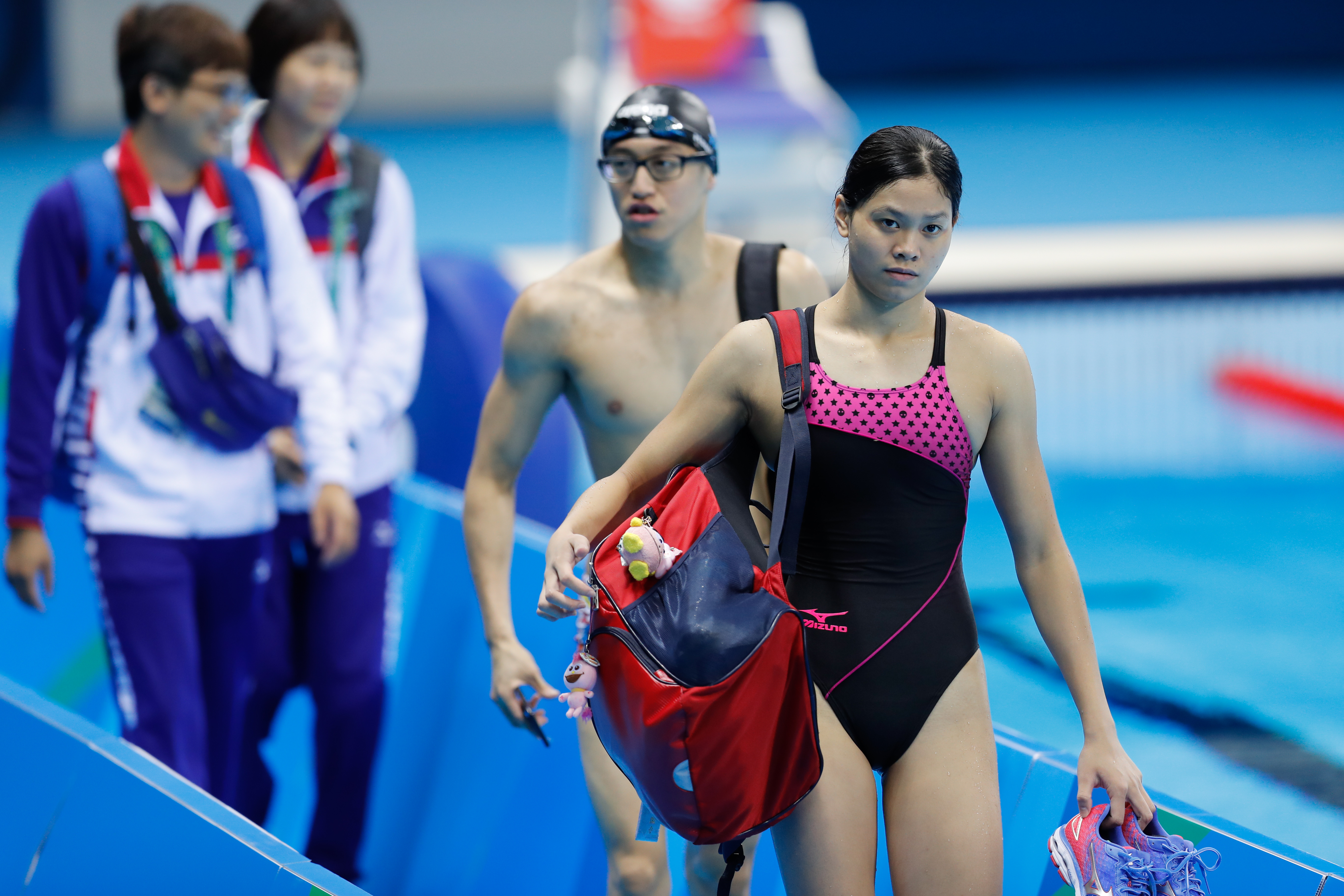 Rio de Janeiro - Atletas da natação treinam na piscina do Estádio Aquático, no Parque Olímpico da Barra da Tijuca (Fernando Frazão/Agência Brasil)